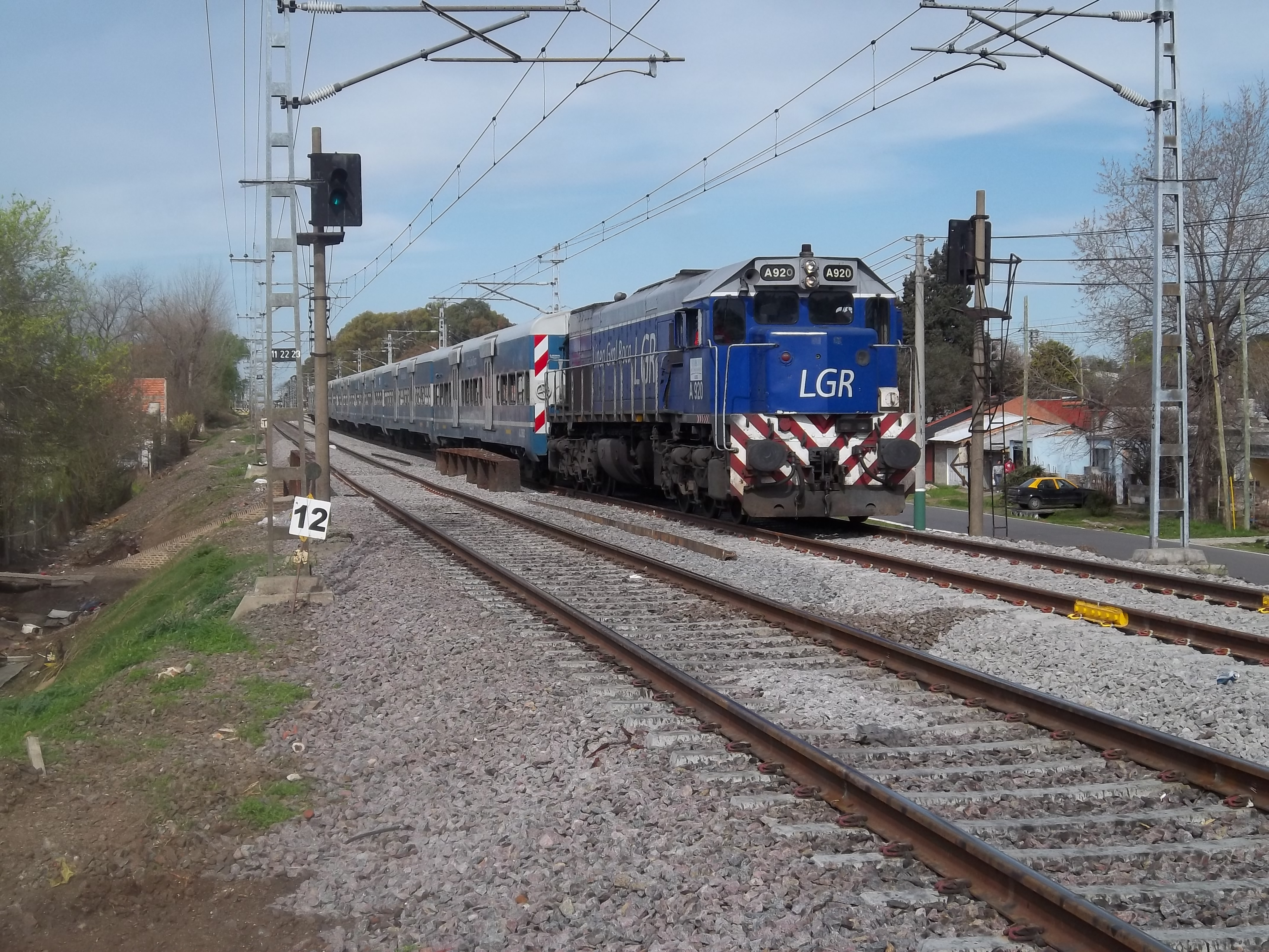 Formación del FCGR entre estaciones Claypole y Rafael Calzada en el lìmite entre ambas ciudades, partido de Almirante Brown, provincia de Buenos Aires, Argentina.